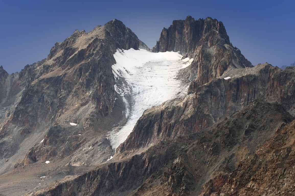 Piz Vadret Pitschen (3218m) und Piz Vadret (3229m), Engadin, vom Piz Sarsura aus gesehen.